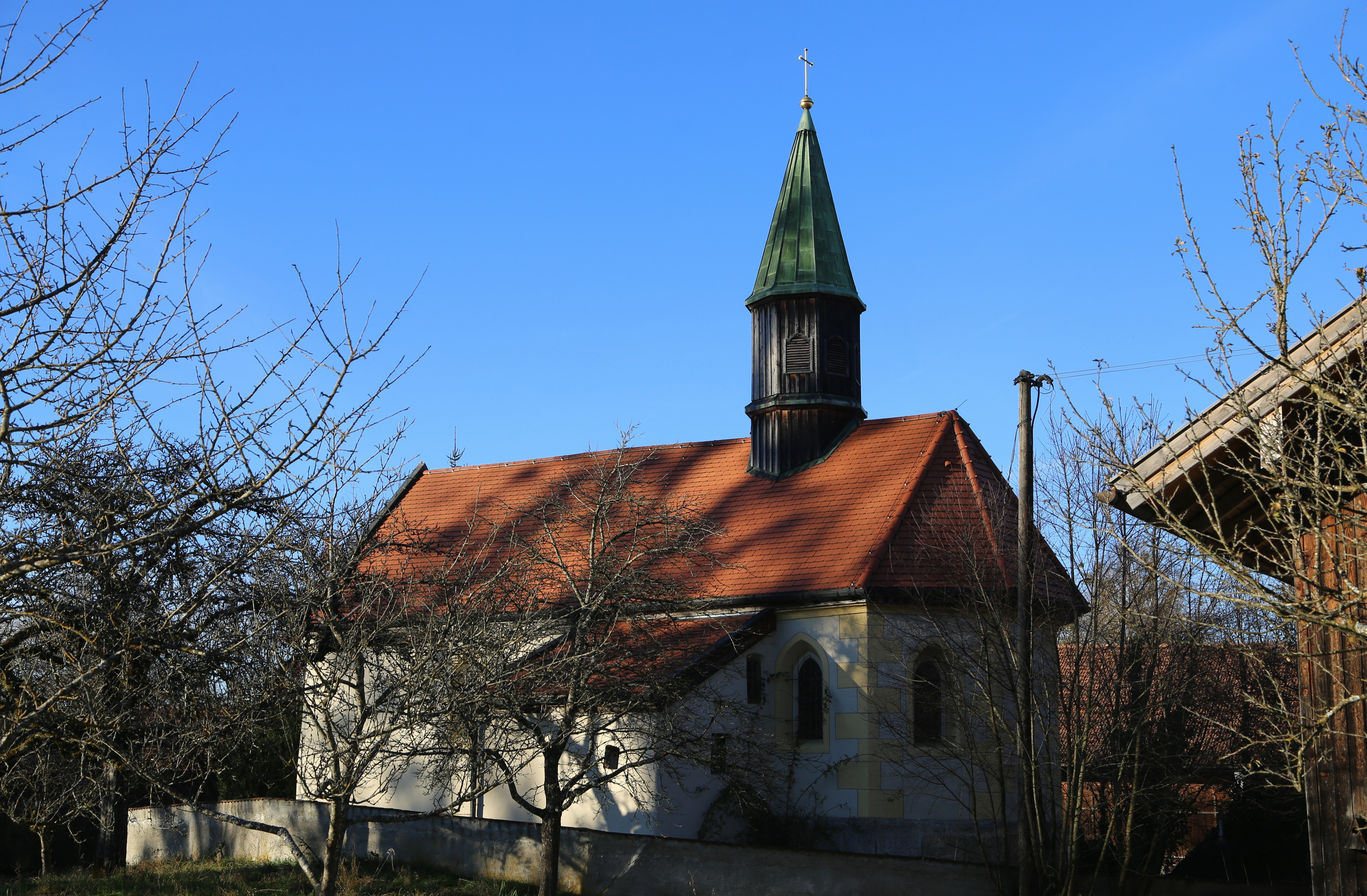 Geilertshausen, Katholische Filialkirche St. Andreas, flacher Saalbau mit eingezogenem Chor und Dachreiter, Anfang 16. Jahrhundert, umgestaltet 1609; mit Ausstattung.